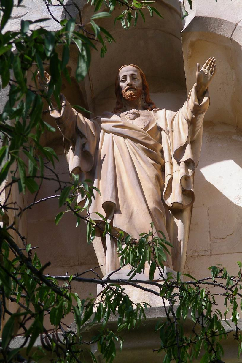 Jesusbildnis Rennes-le-Château